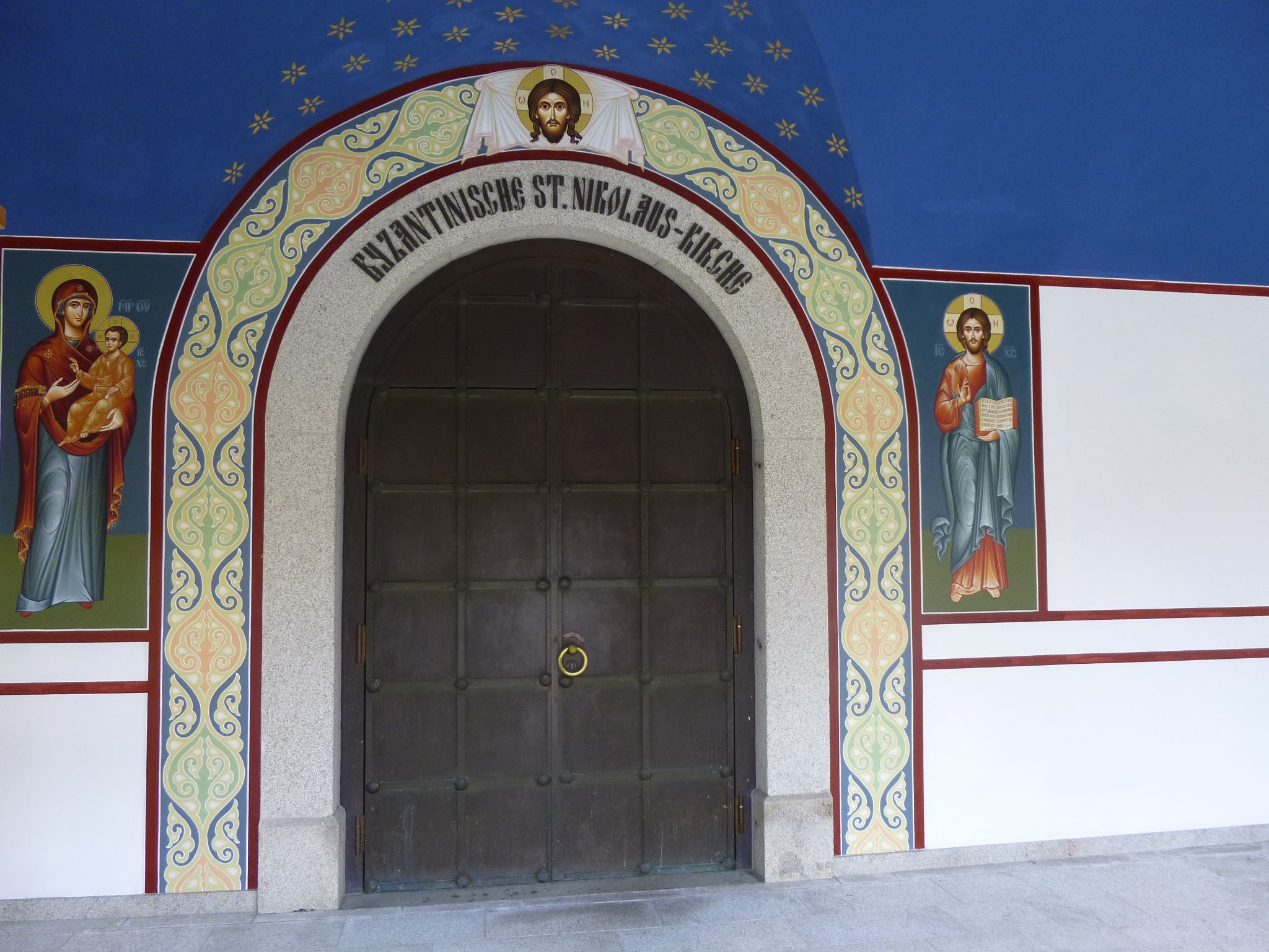 Die byzantinische St. Nikolauskirche in der Benediktiner-Abtei Niederalteich.This is a photograph of an architectural monument.